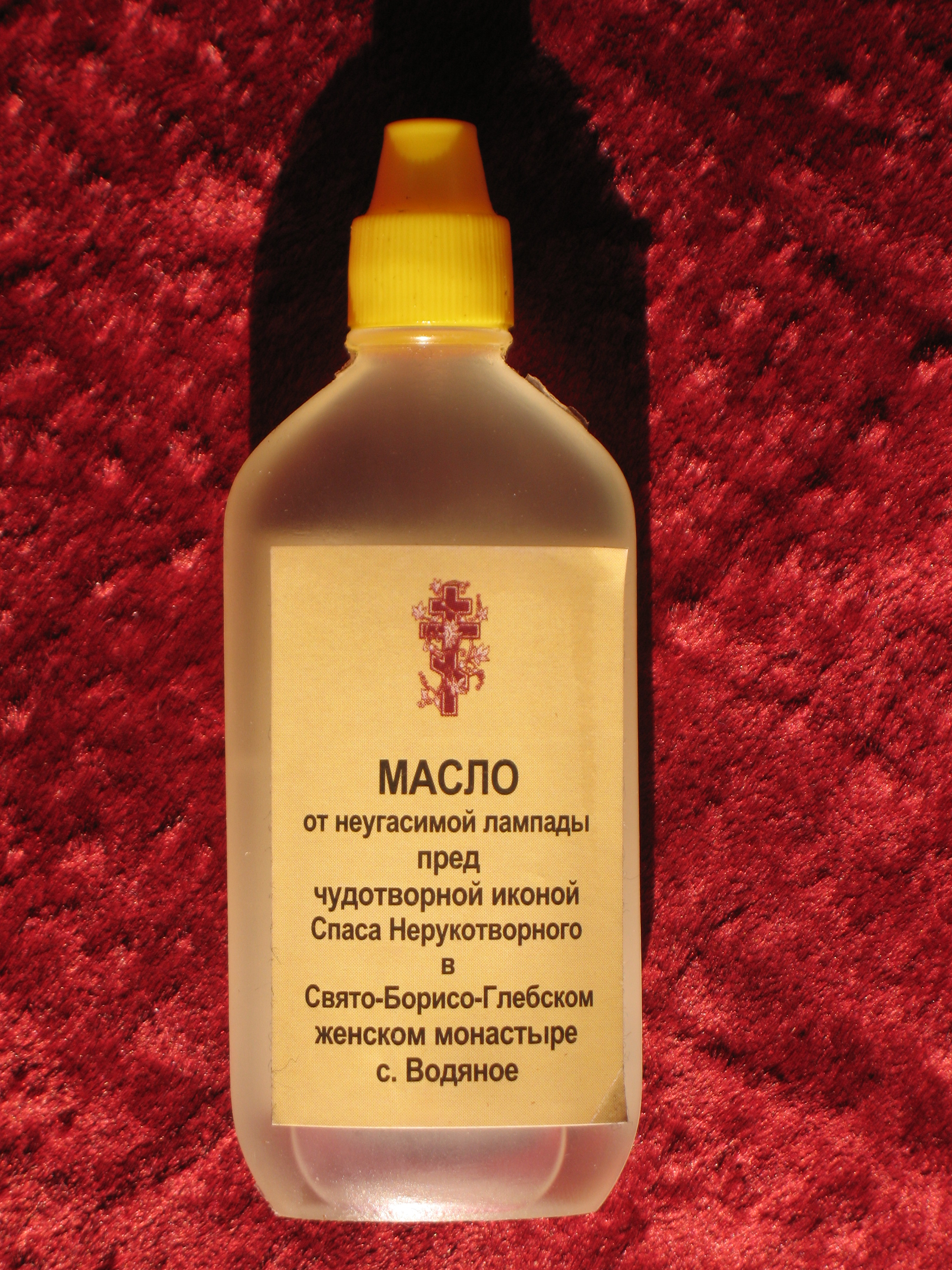 Масло от обновившегося 20 июля 1997 года образа Спаса Нерукотворного (Водяное, Змиевской район, Борисоглебский монастырь).